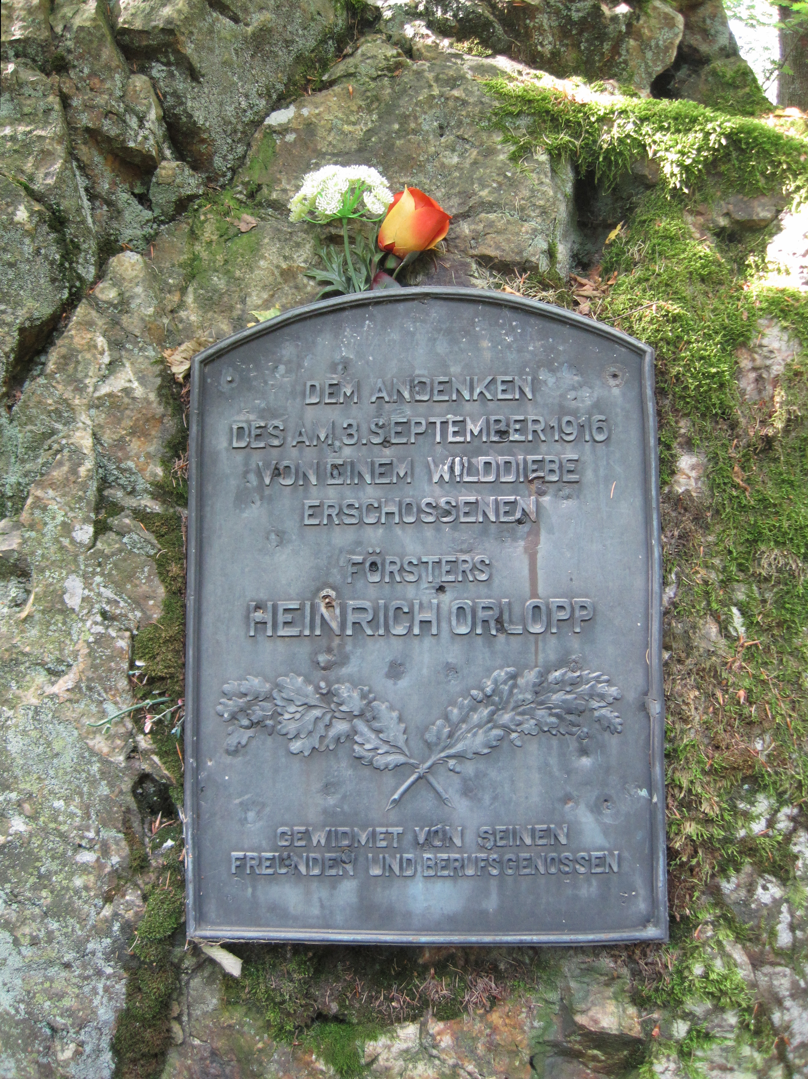 Gedenkstein für den von einem Wilddieb erschossenen Hallgartener Gemeindeförster Heinrich Orlopp (* 21. April 1869 † 3. September 1916) in der Nähe der Kalten Herberge. Rheingau-Taunus-Kreis, Hessen.